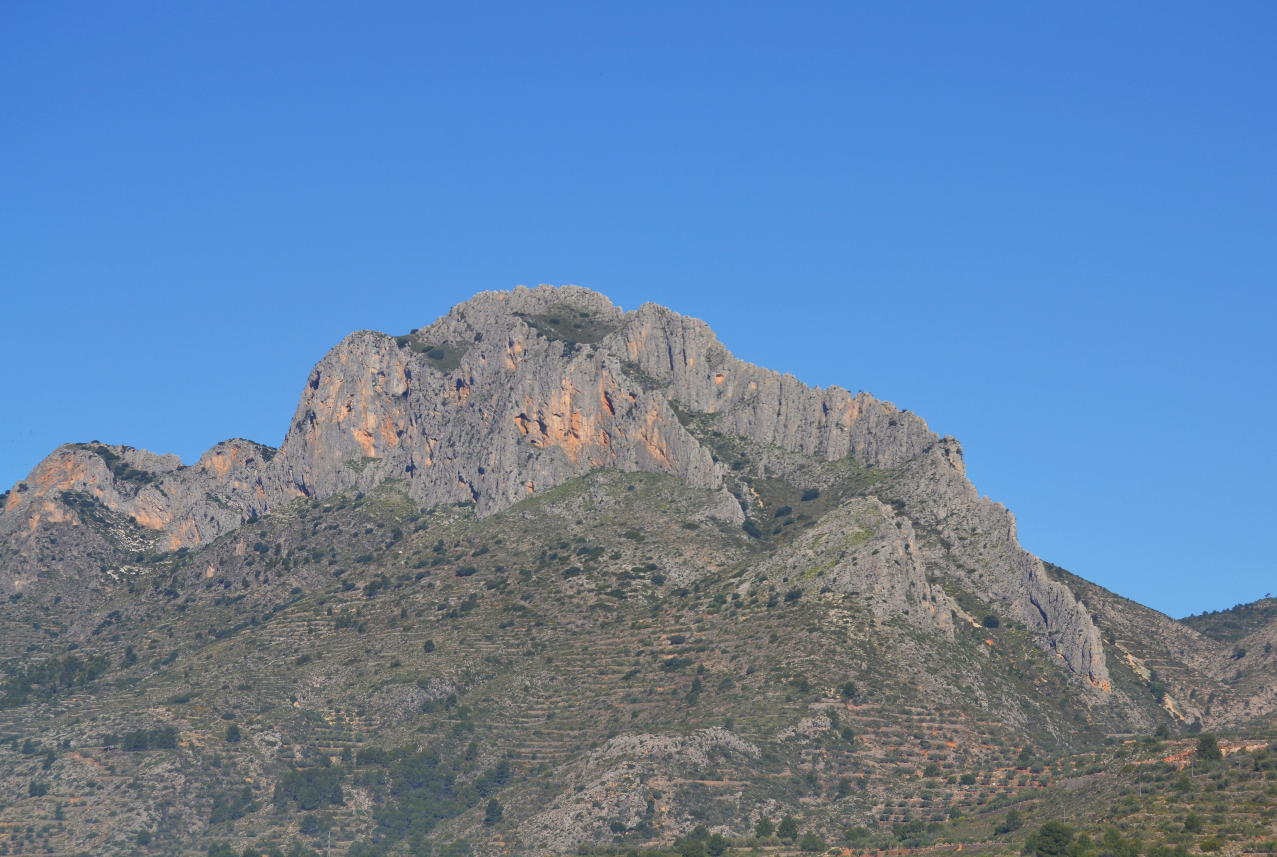 El Benicadell vist des de l'ermita de Beniarrés.